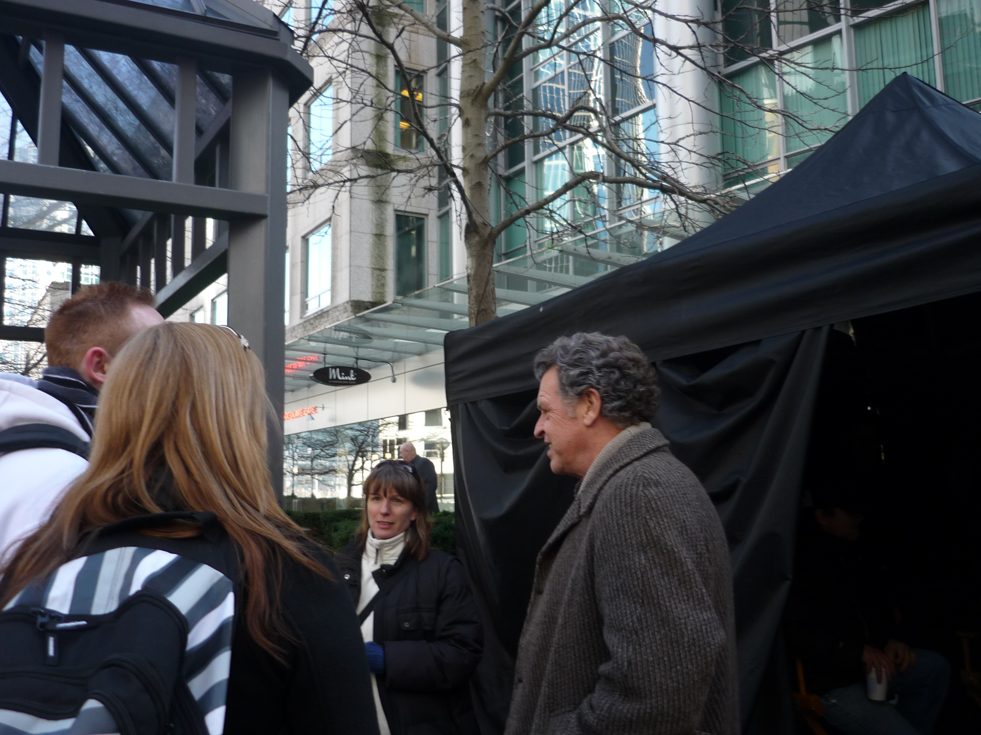 Fringe filming